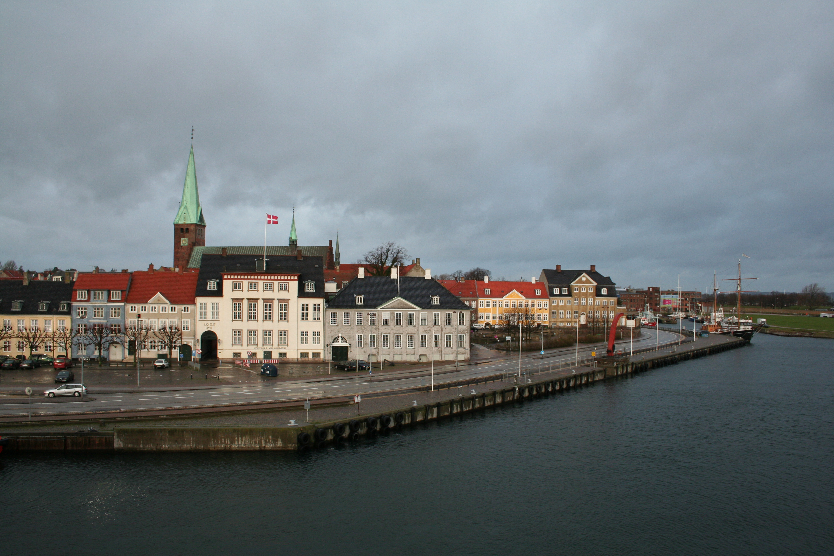 Un quai d'Elseneur, au Danemark.